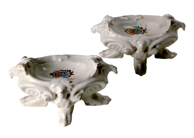 Coppia di saliere in stile compendiario. Faenza XVII secolo